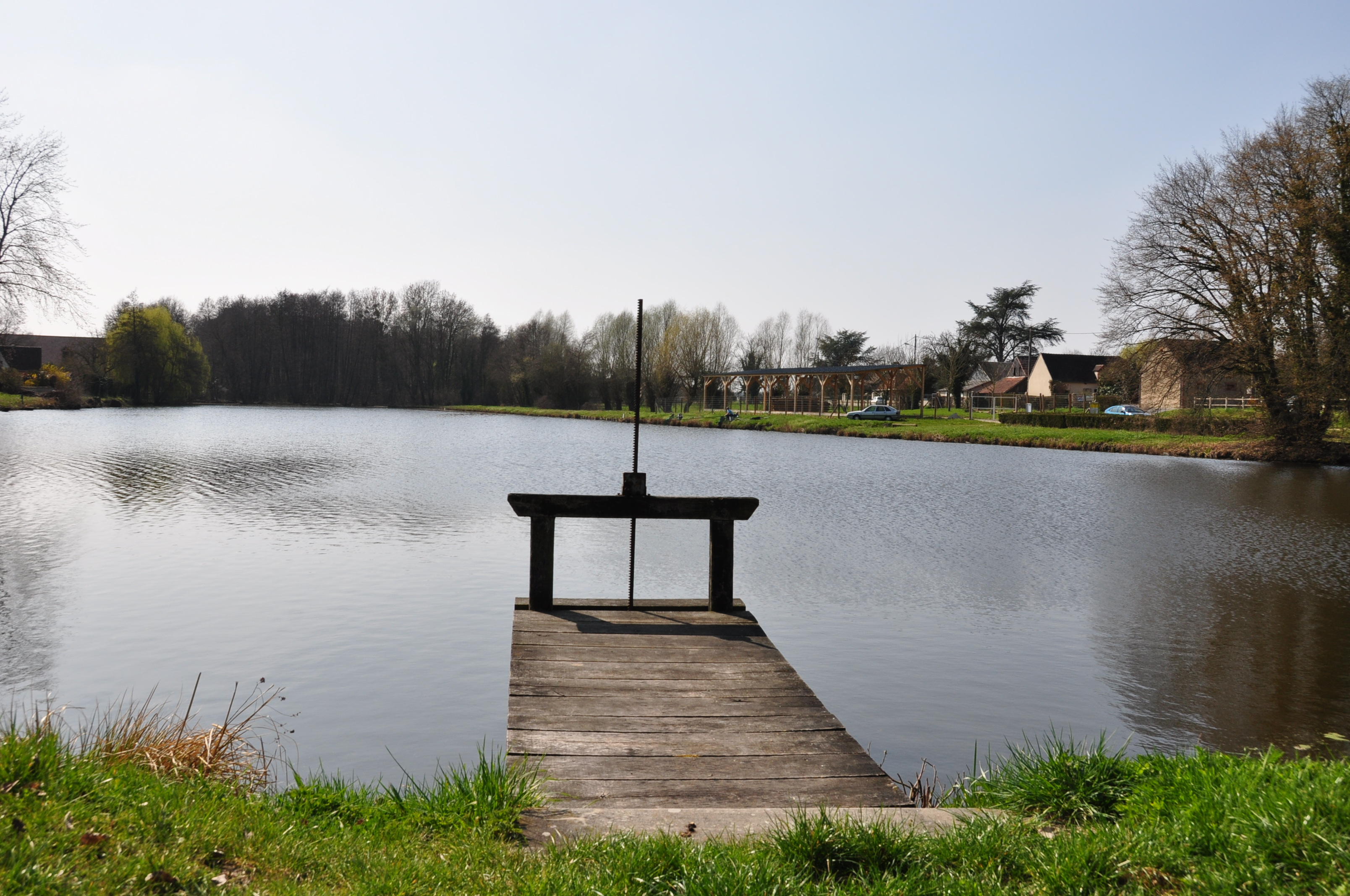 Site de Grignon sur le canal d'Orléans, étang. Vieilles-Maisons-sur-Joudry, Loiret, Centre, France. Ce ponton se trouve sur la rive nord-ouest de l'étang. Le Joudry y conflue à l'extrémité sud-ouest, sur la droite de la photo.